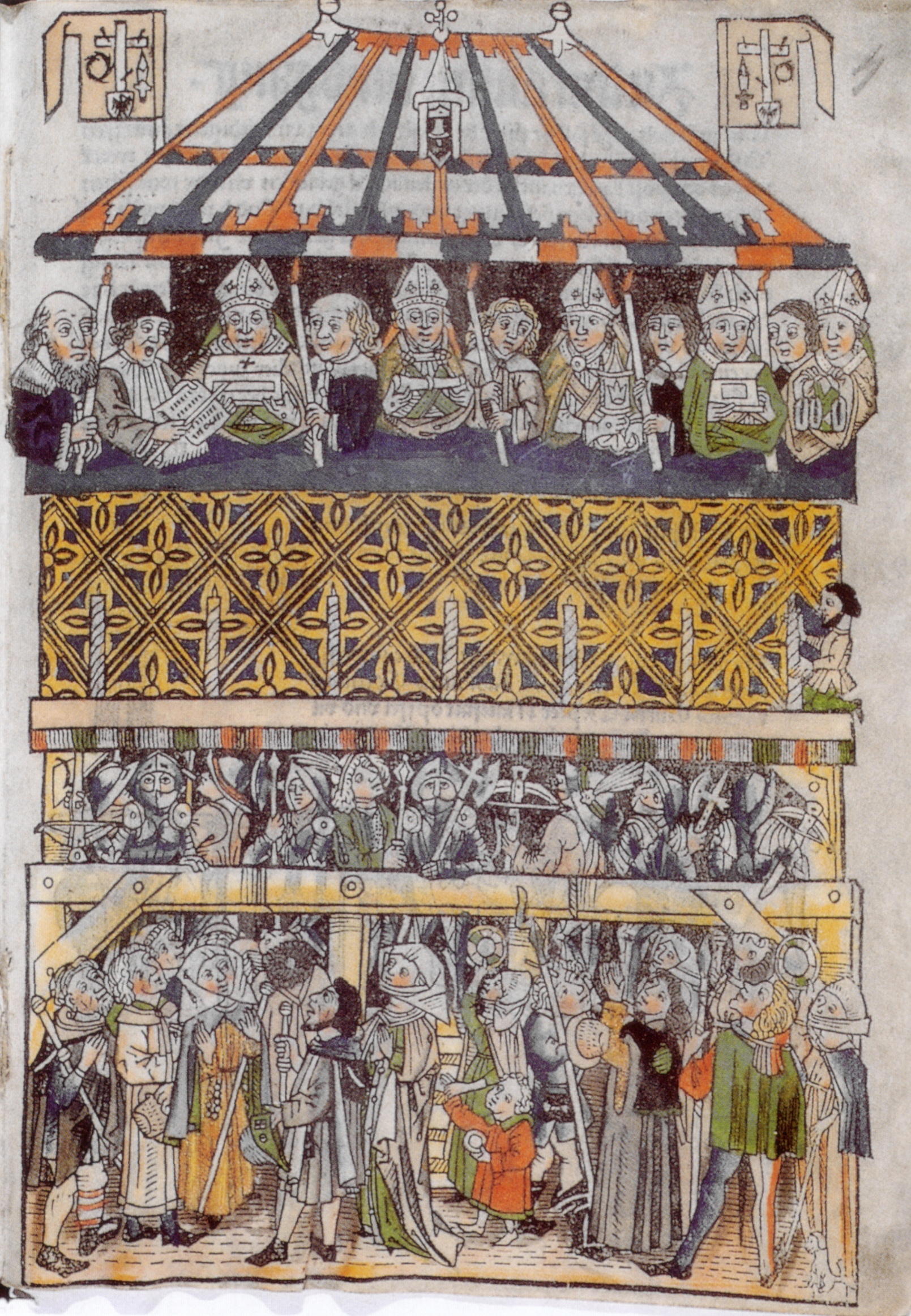 Heiltumsweisung am Schopperschen Haus, Nürnberg Holzschnitt von 1487 aus einem Heiltumsbüchlein, Staatsarchiv Nürnberg, Rst. Nürnberg Handschriften 399a.